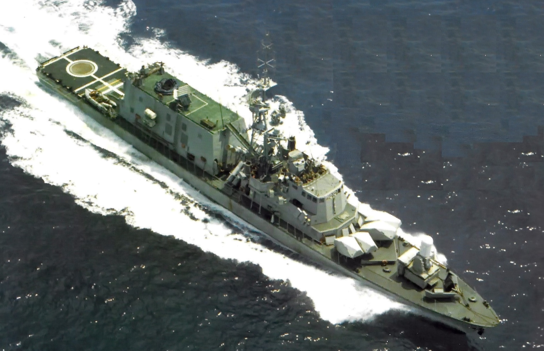 ספינת טילים אח"י גאולה מדגם חוחית